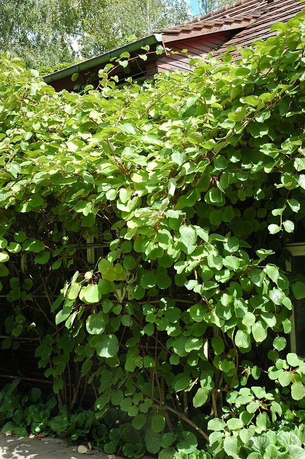 Actinidia chinensis "Ashoka" / Pflanze / Botanischer Garten Berlin